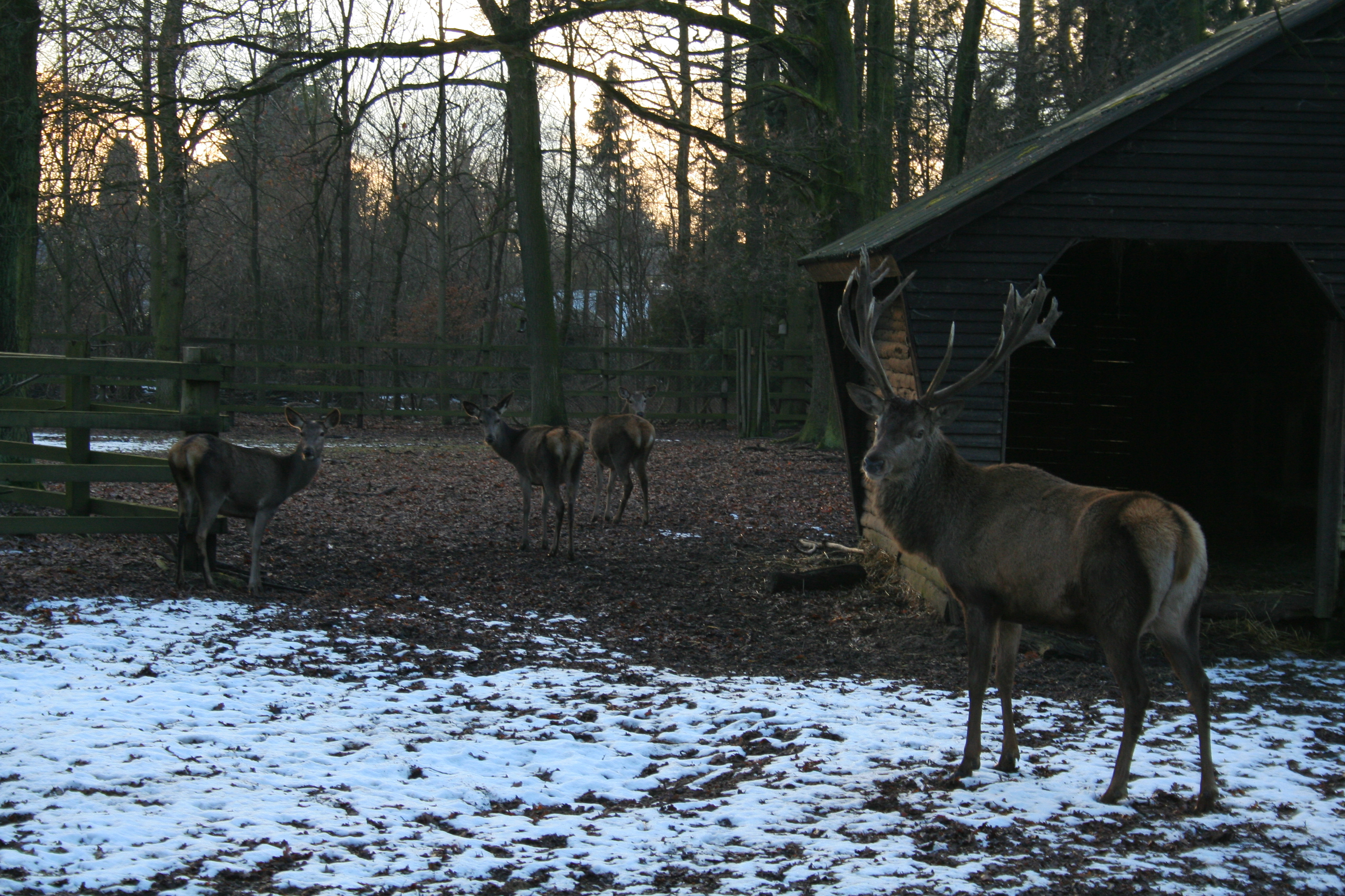 Wildpark Tannenbusch bei Dormagen. Rothirschgehege.